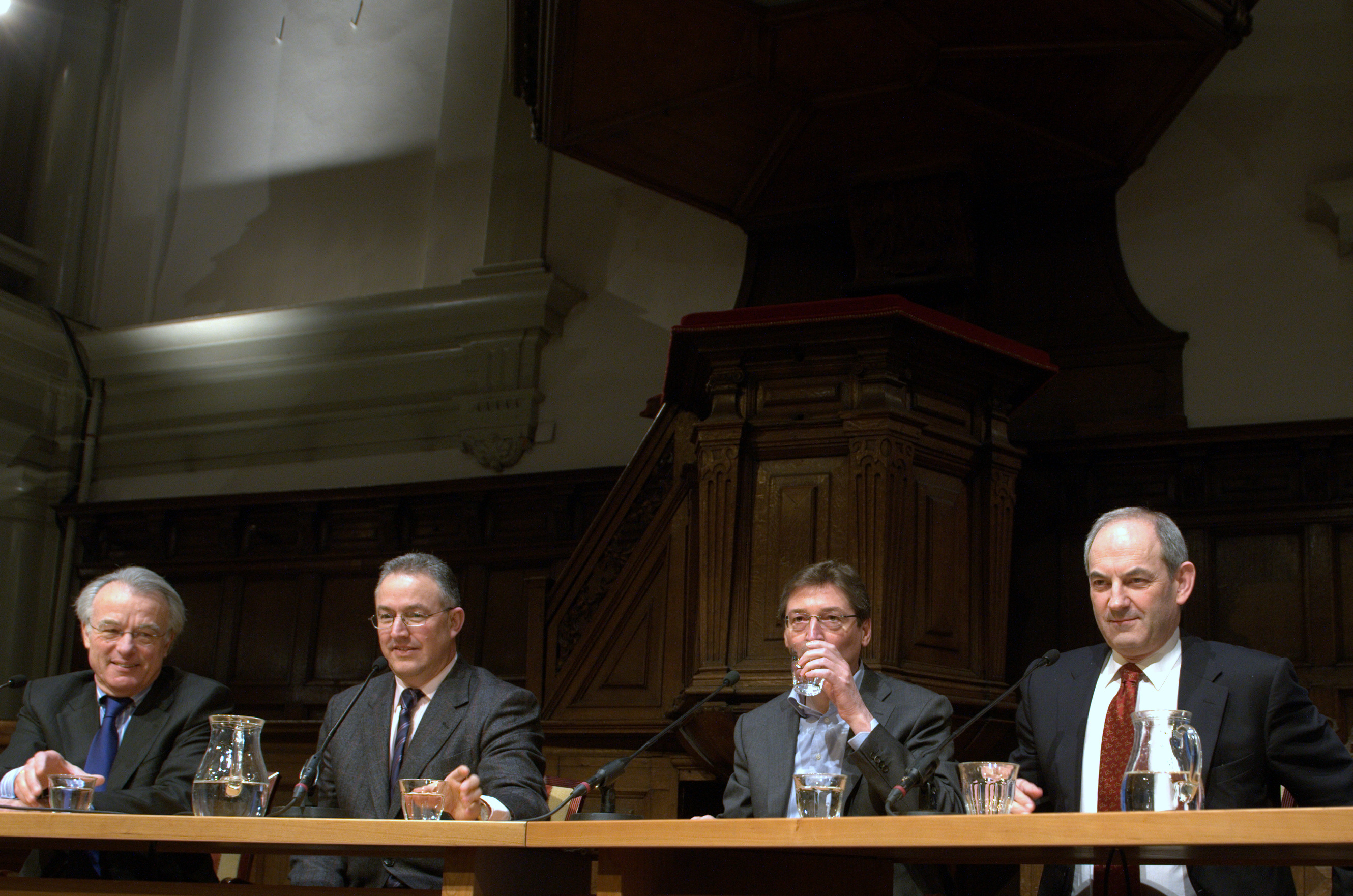 Een debat met de burgemeesters van de vier grote steden: Jozias van Aartsen, Ahmed Aboutaleb, Aleid Wolfsen en Job Cohen. Georganiseerd door de Volkskrant in De Rode Hoed te Amsterdam.